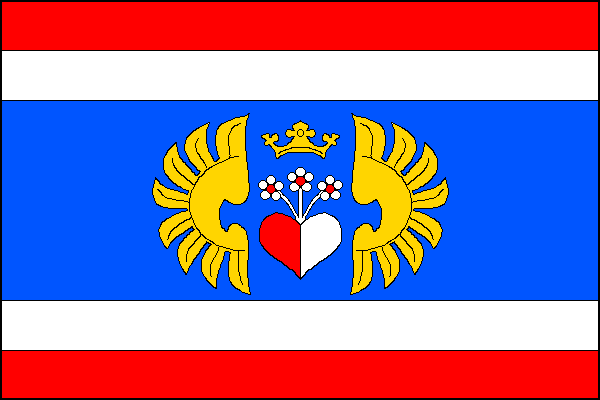 vlajka,Milíčovice , okres Znojmo